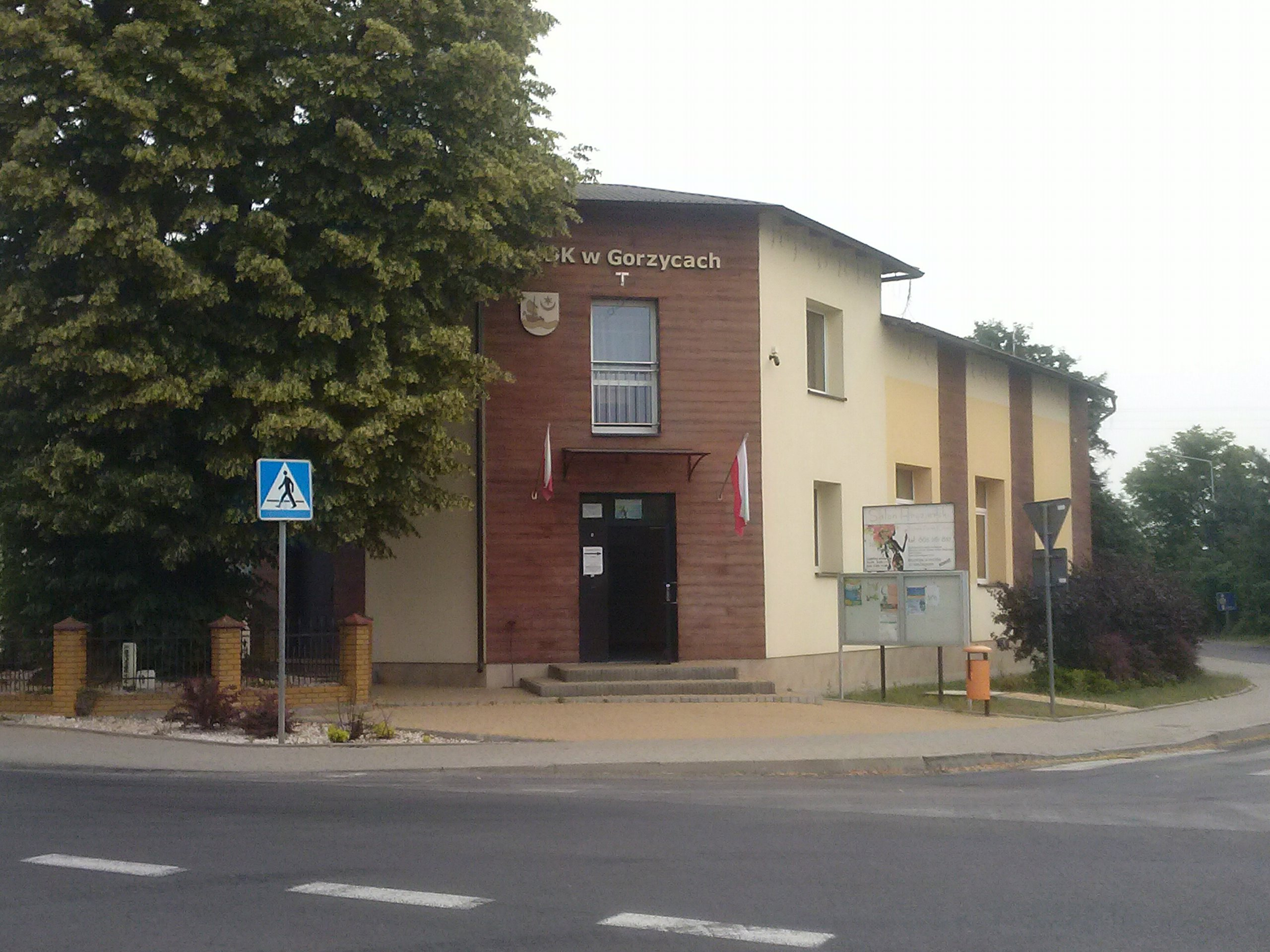 Wiejski Dom Kultury w Gorzycach